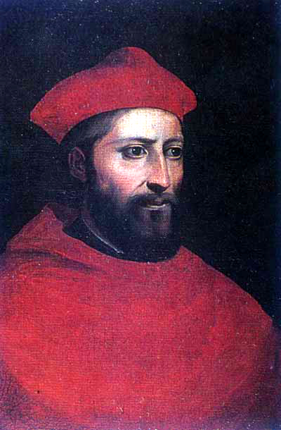 Bernardino Santini, Portrait of cardinal Benedetto Accolti. Oil on Canvas, Arezzo, Quadreria Comunale.